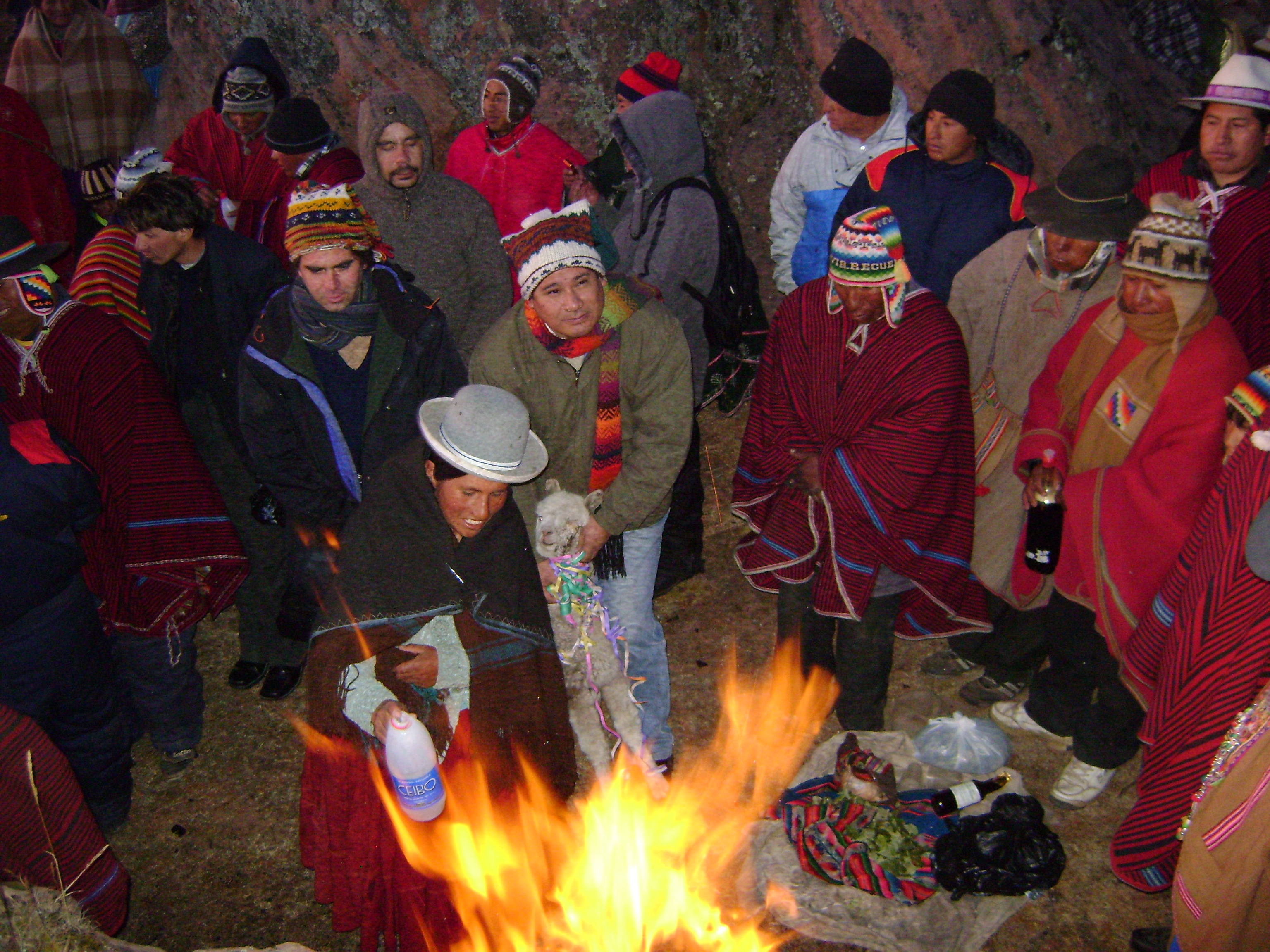 La wilancha se hace cada 21 de junio (Año Nuevo Aymara - Willka Kuti) en el lugar de Pä Wila Qala de Provincia Camacho, y su posterior demostracion de Danzas autoctonas en Marka Wilaqala de Canton Villa Rosario.